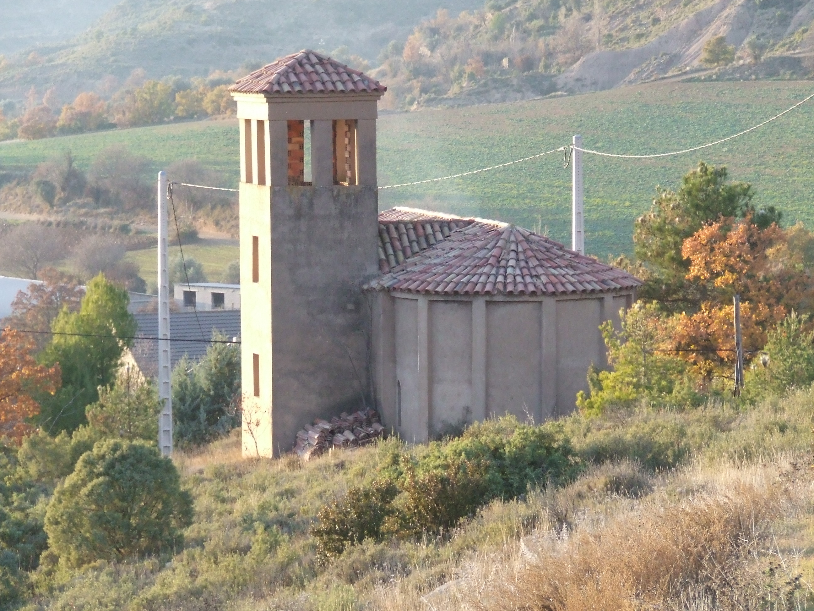 Santa Àgueda, des de dalt (Abella de la Conca, Pallars Jussà)